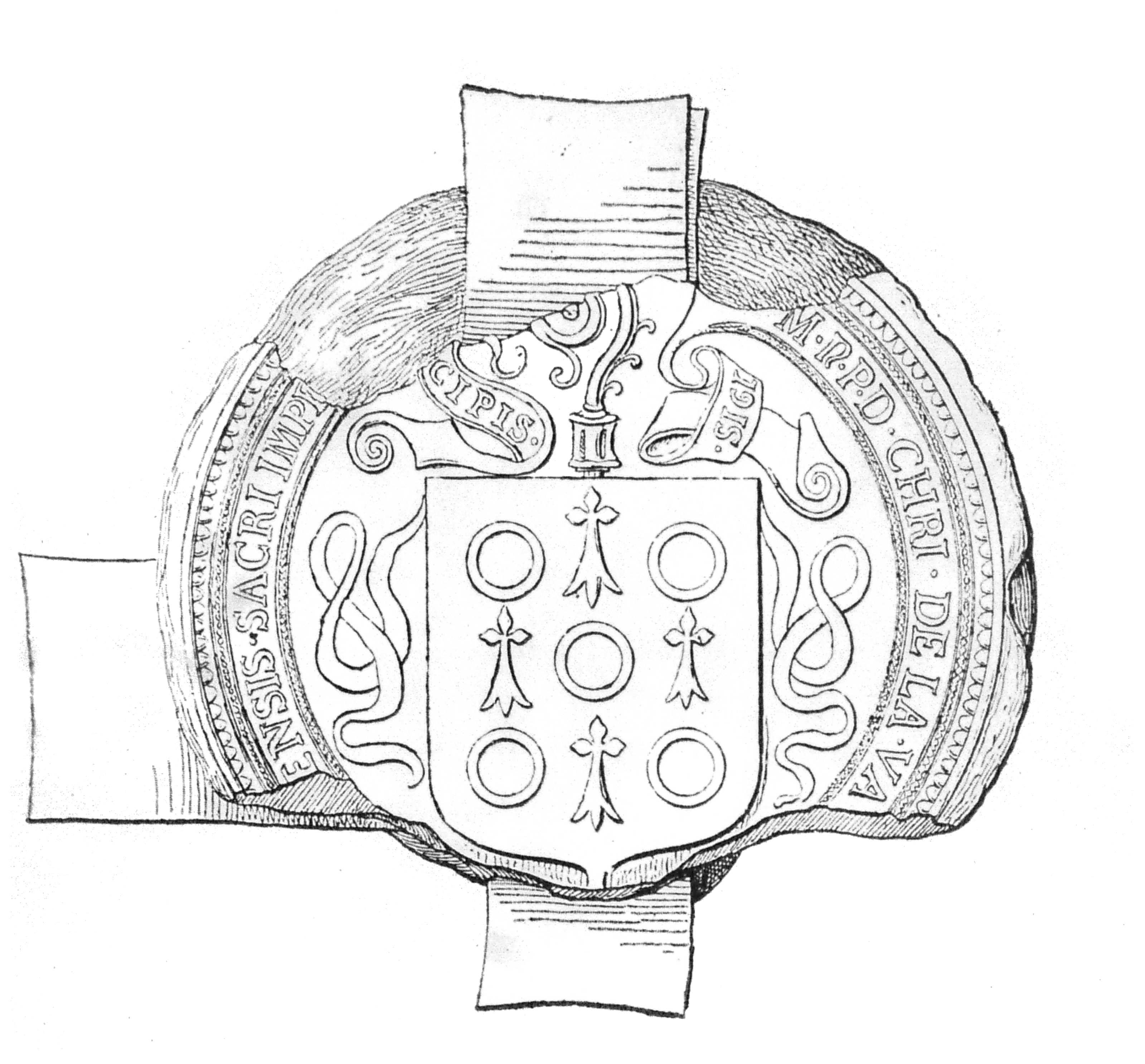 dessin représentant le sceau de l'évêque de Toule.